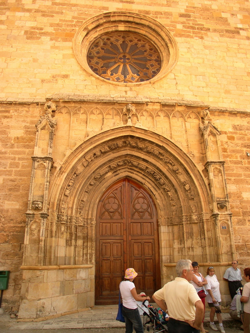 Casco histórico. Castellote, Teruel, Aragón, España/Spain arquitectura, iglesia, tímpano